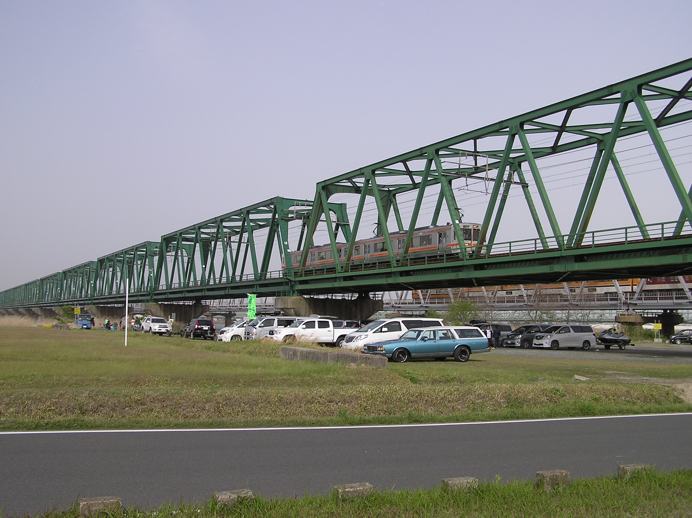 木曽川橋梁（JR関西本線）(愛知県弥富市、三重県桑名市)